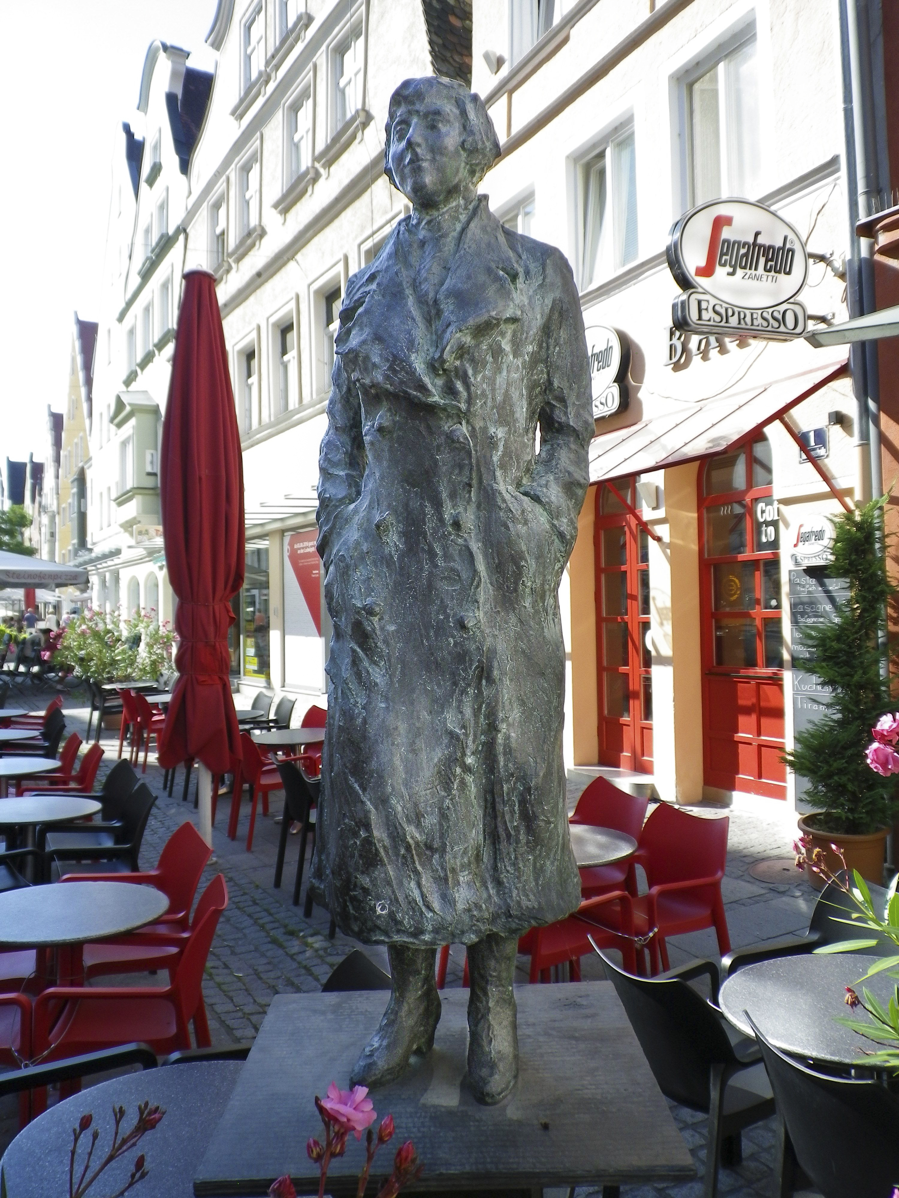 Statue von Marieluise Fleißer